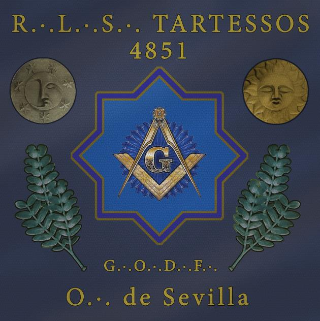 Interpretación artística del sello de la Logia Tartessos, de Sevilla. Gran Oriente de Francia.